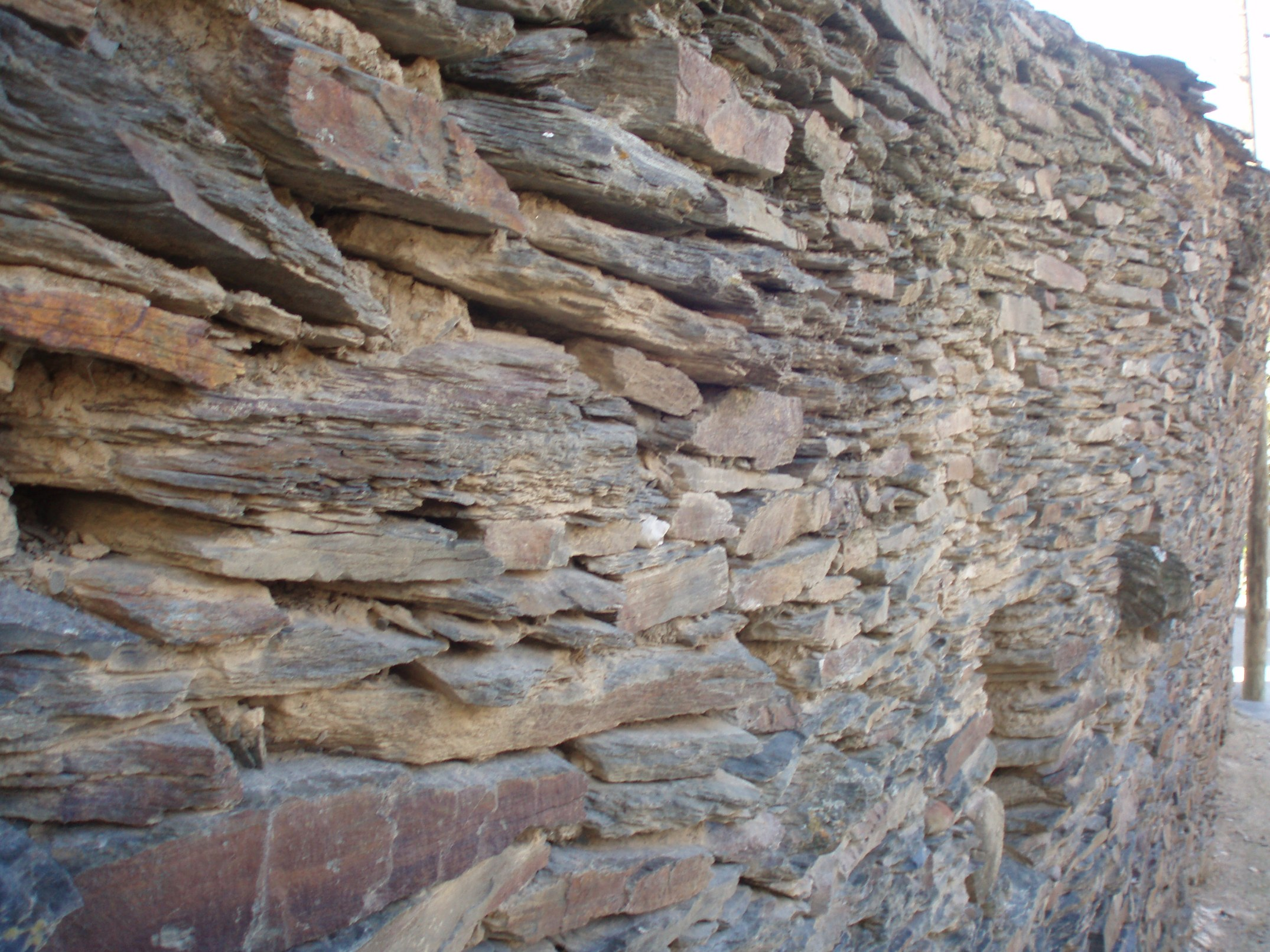 Muro de pizarra y adobe representativo de la arquitectura negra en Majaelrayo (Segovia), España.